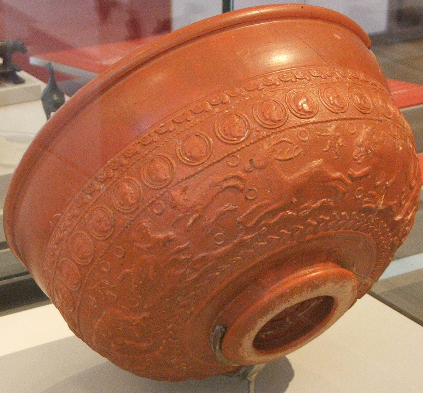 Une coupe de Céramique décorée de fresques animalières. La production est du centre de la Gaule romain, aux alentours du IIè siècle. Elle fut retrouvée sous le site archéologique des Halles au Mans.